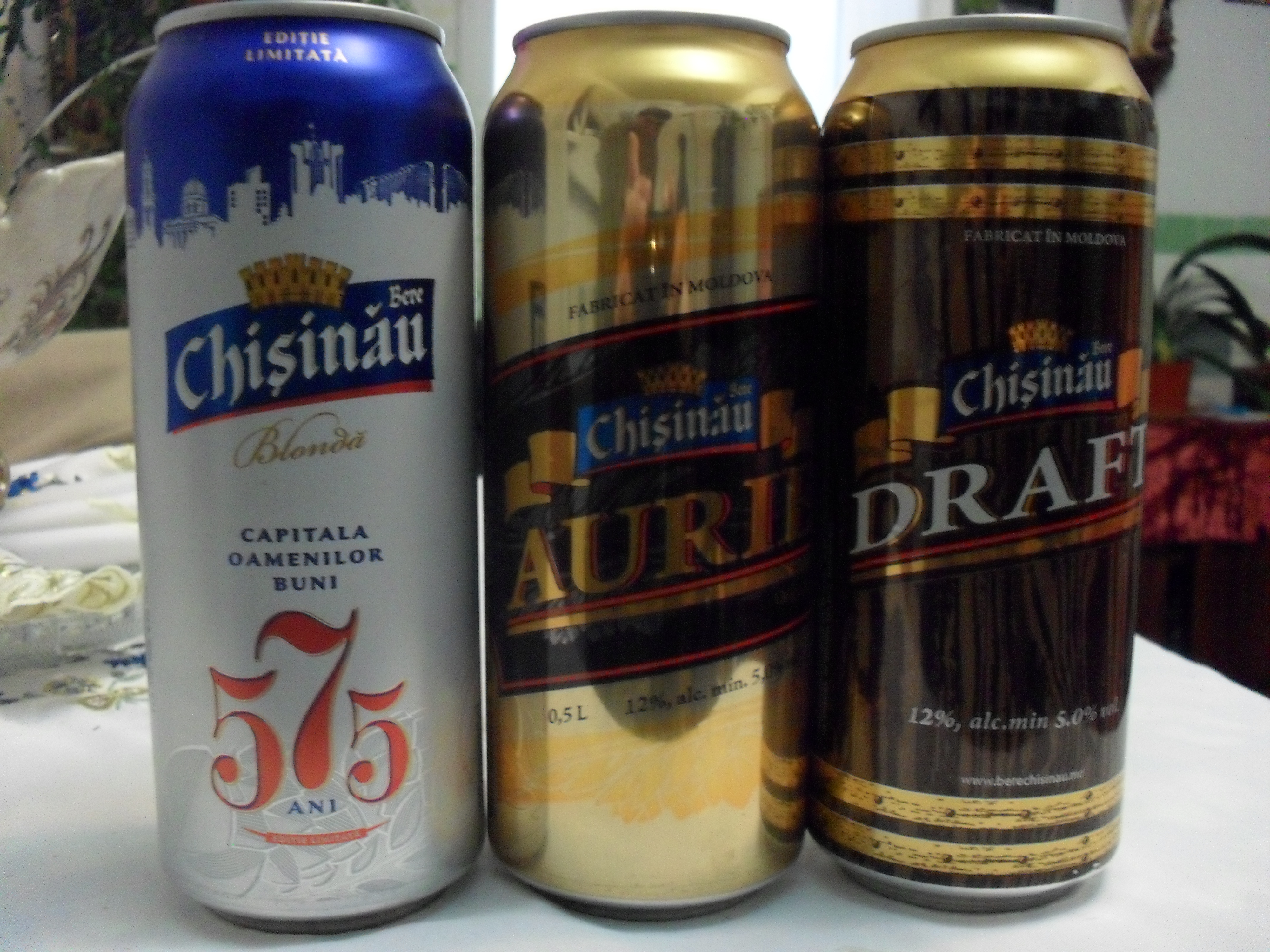 Пиво Chișinău